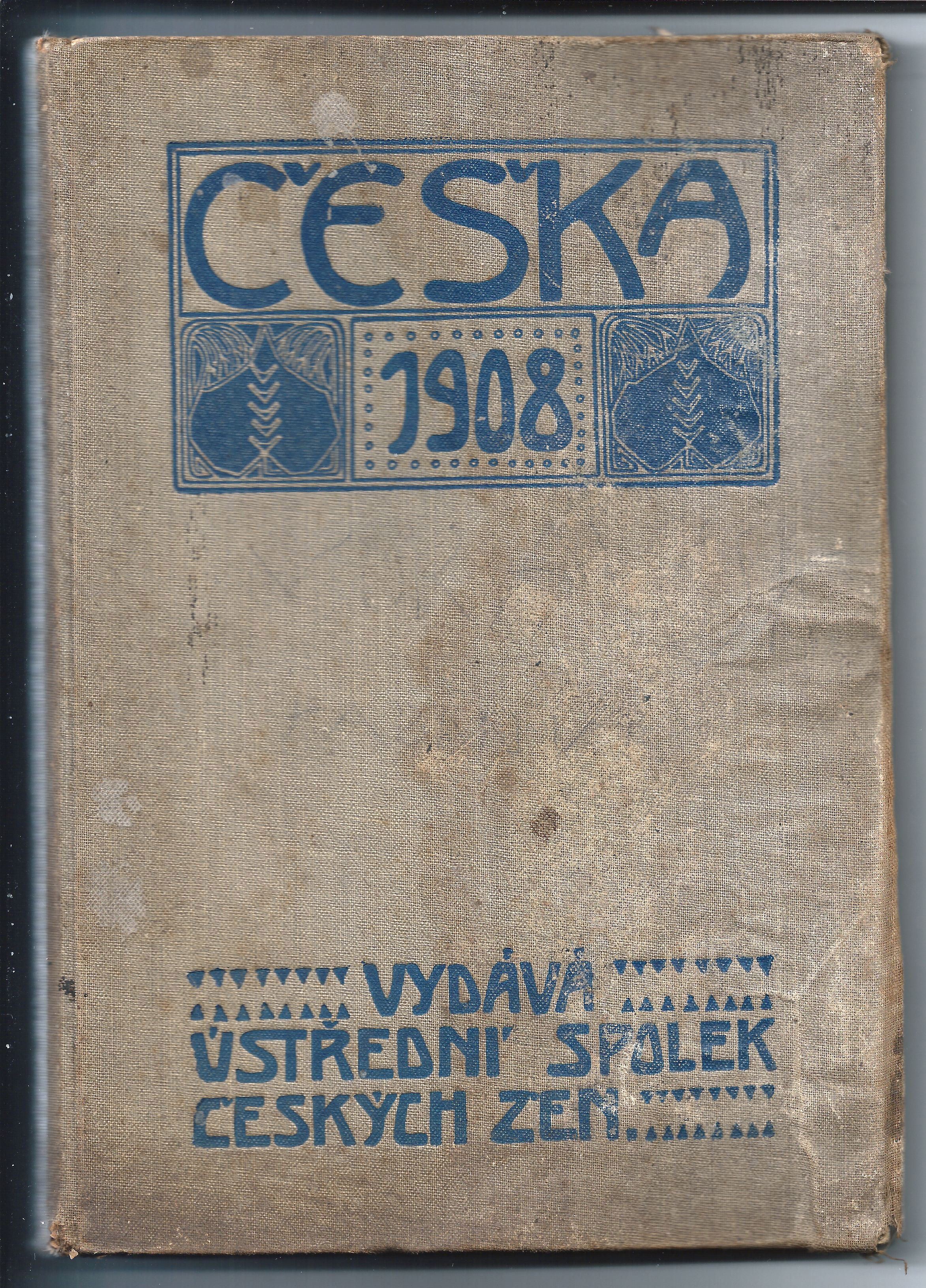 Obálka almanachu Češka 1908